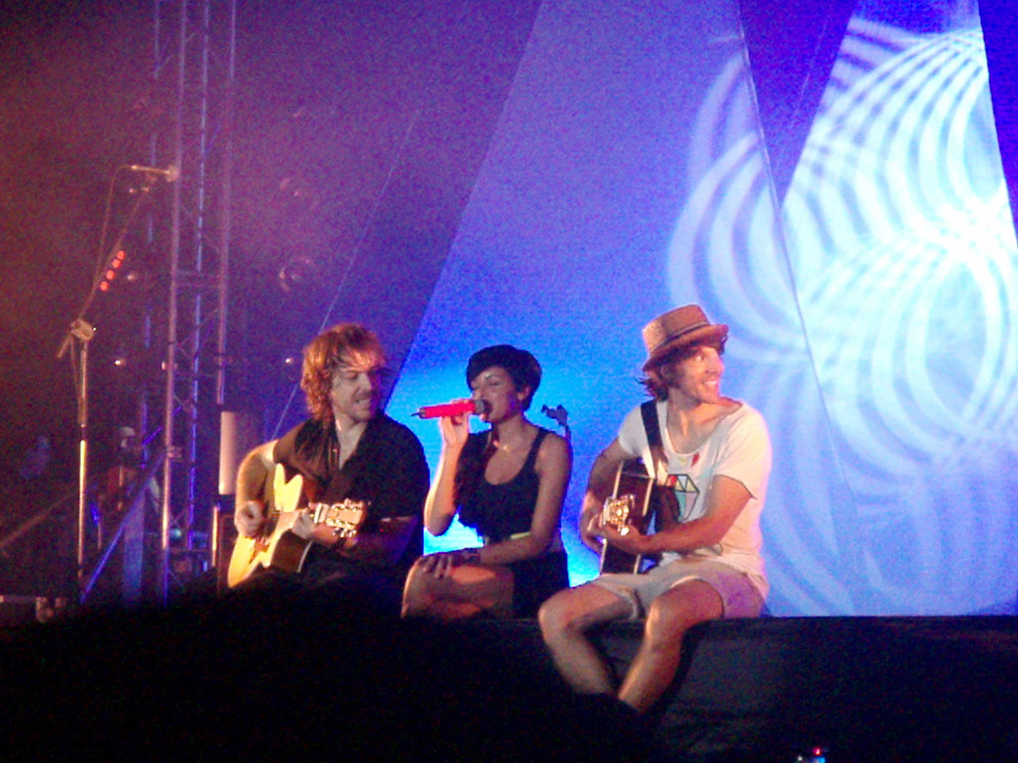 El Sueño de Morfeo en un concierto en Castelldefels (Barcelona). Agosto de 2009.